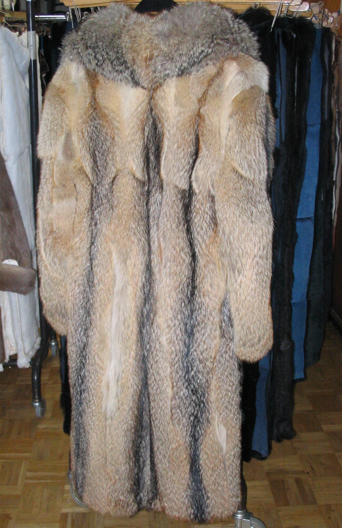 Alter Feuerland-Fuchsmantel